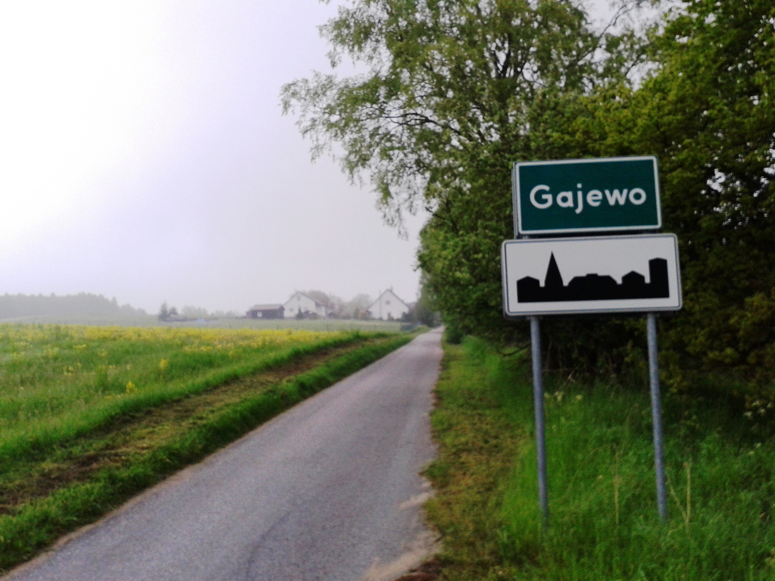 Gajewo - gmina Drawsko Pom.